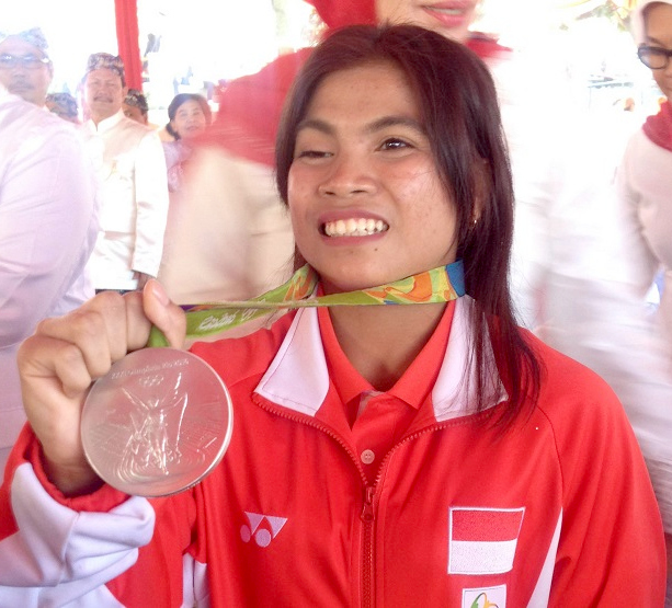 Sri Wahyuni Agustiani